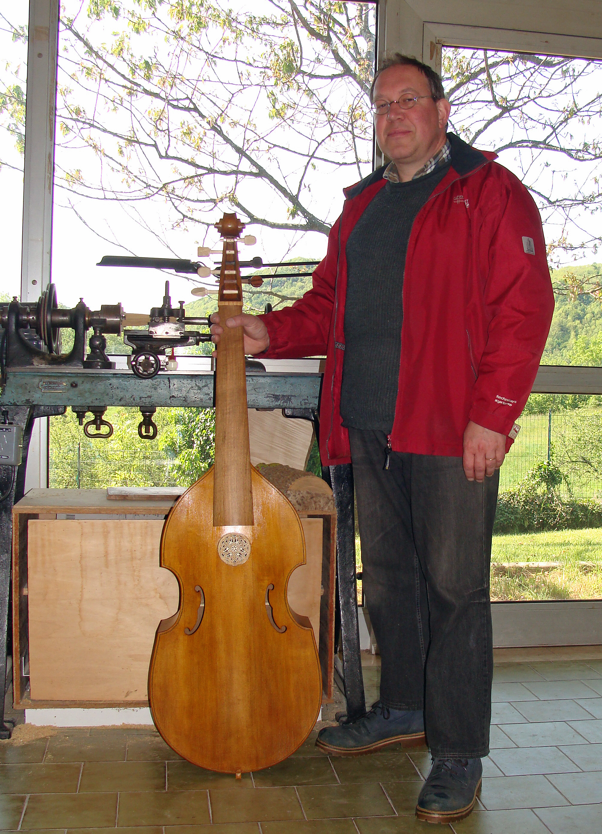 le luthier de Monteaperta (Frioul) Marco Ternovec dans son atelier.